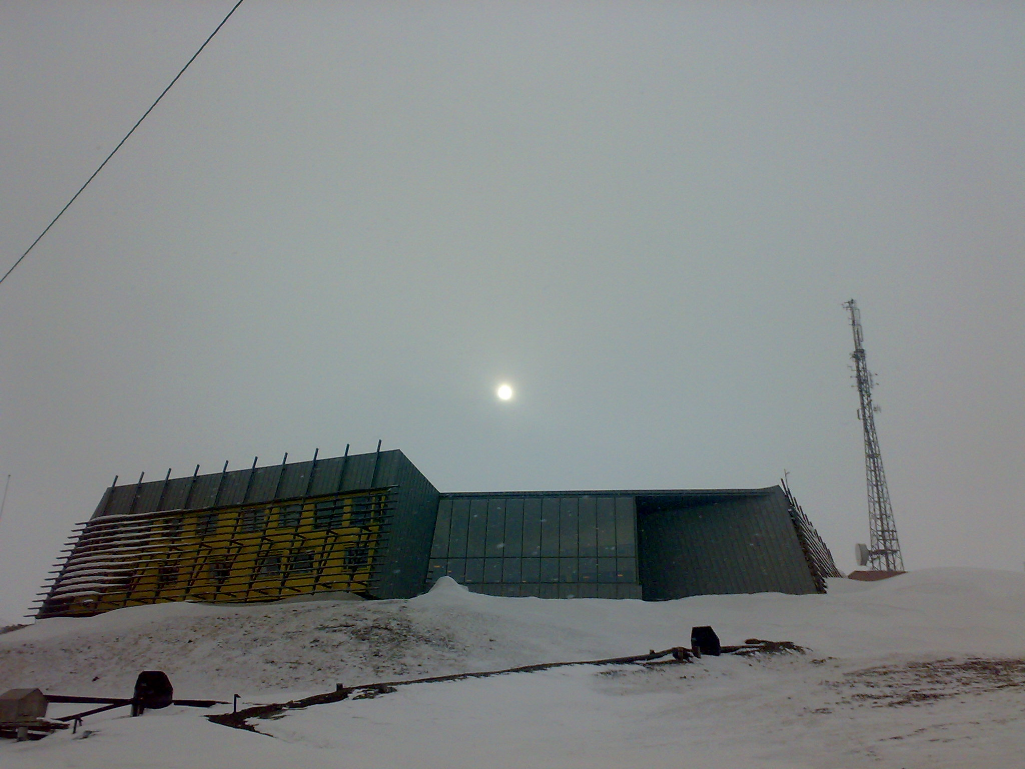 Sysselmannen building, Longyearbyen